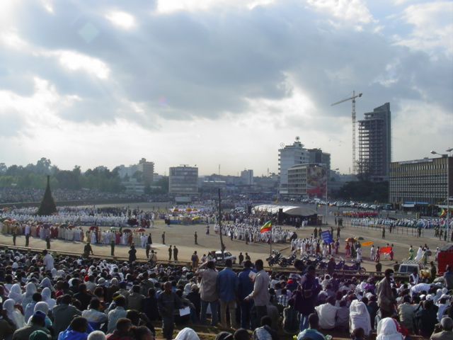 Meskal Square, Addis Ababa, Ethiopia